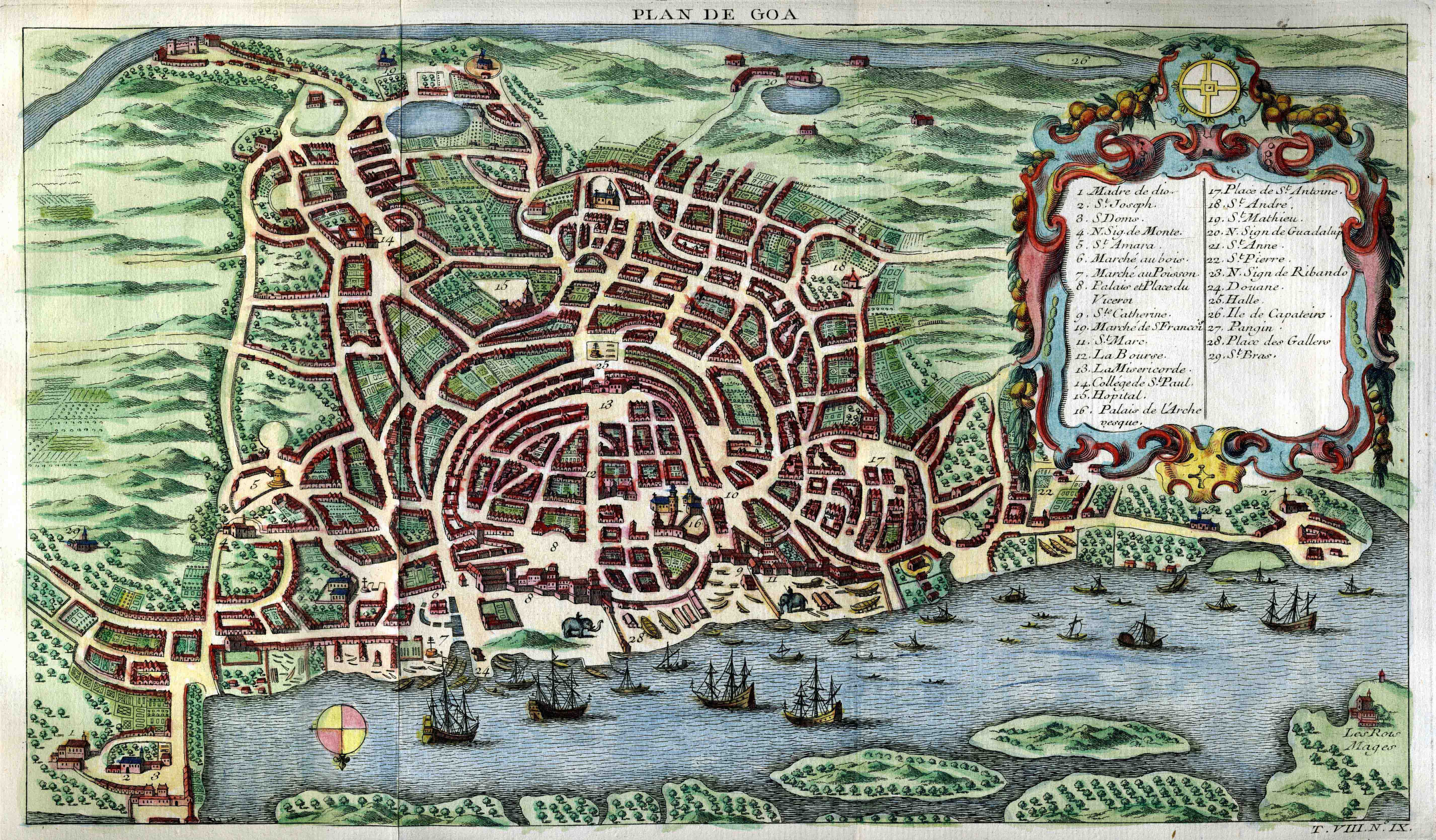 "Plan de Goa", Goa. PREVOST D’EXILES, Antoine François. "Histoire générale des Voyages, ou Nouvelle Collection de toutes les Relations de Voyages par Mer et par Terre, qui ont été publiées […] Avec les mœurs et les usages des habitans, leur Religion, leur Gouvernement, leurs Arts et leurs Sciences, leur Commerce et leurs Manufactures; pour former un système complet d’histoire et de géographie moderne […]". Paris: Didot, 1746-1789.